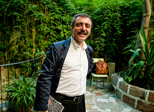 Manuel Borja-Villel, historiador del arte y director del Museo Reina Sofía en el patio de La Casa Invisible